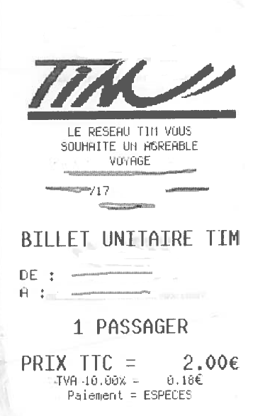 Billet unitaire TIM (tranports interurbains du morbihan)